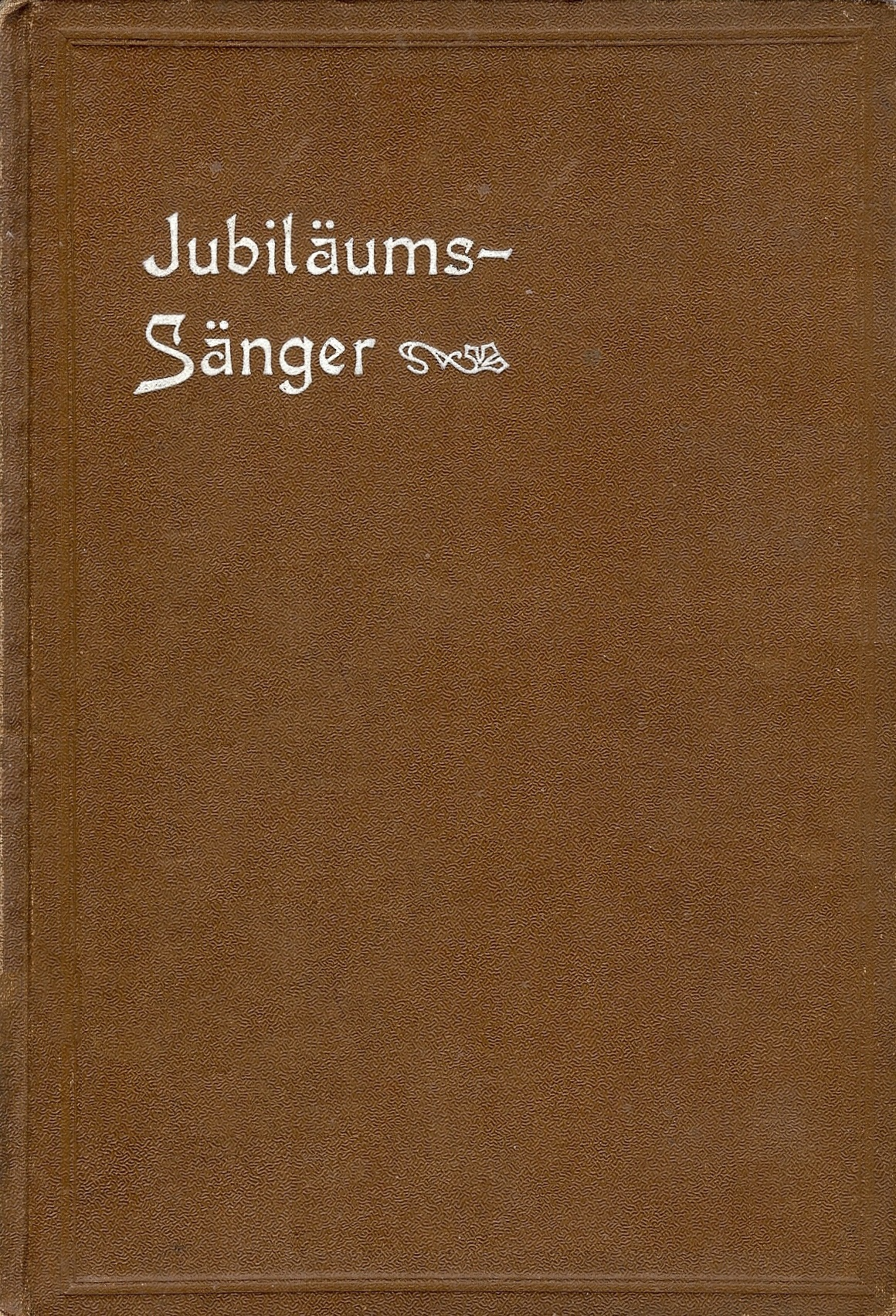 Ernst Gebhardt - Jubiläumssänger, Basel, 1878, Geistliche Lieder aus den Vereinigten Staaten von Amerika ins Deutsche übertragen ("Negerlieder")